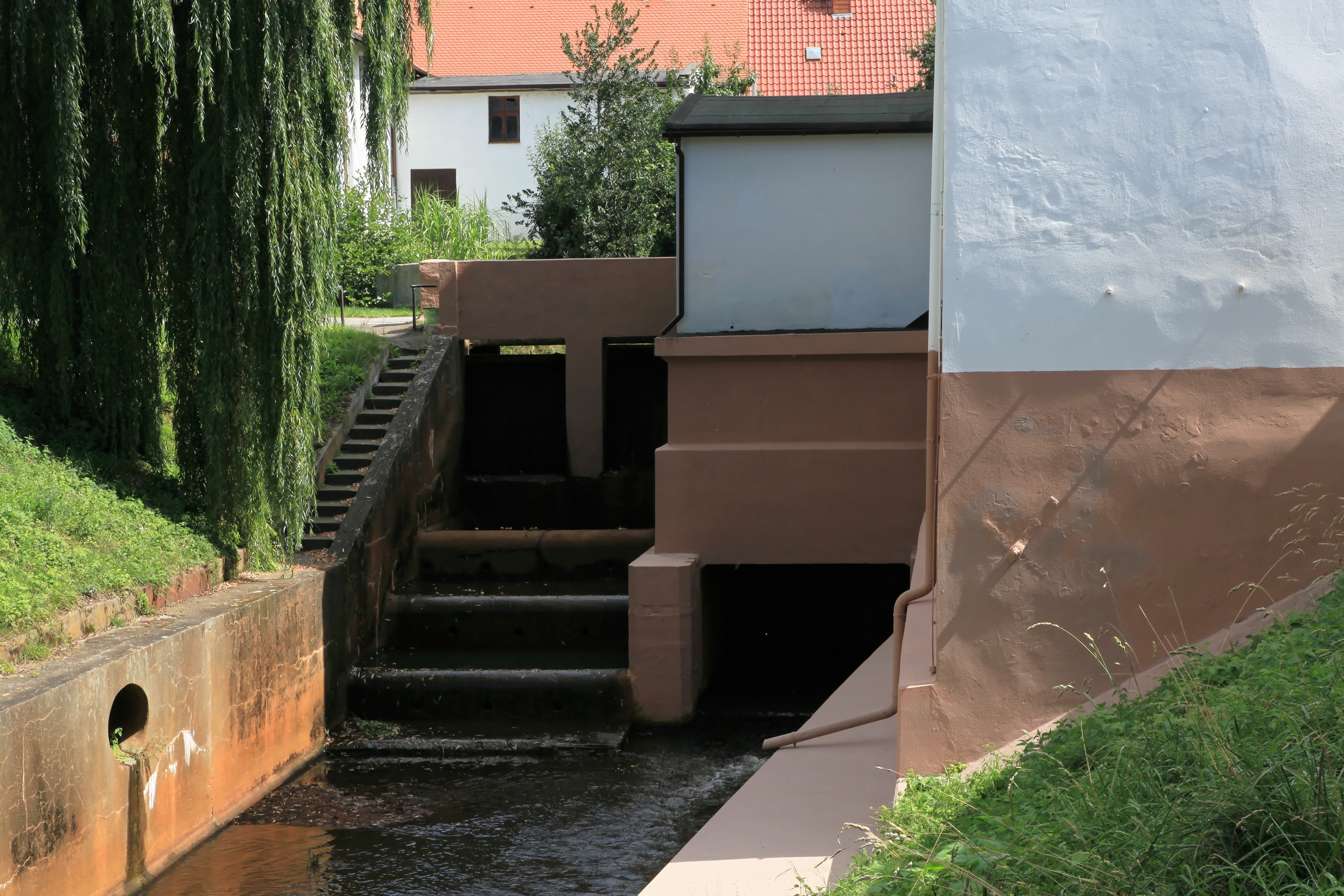 Stadtmühle, Am Lauch in Bad Düben)